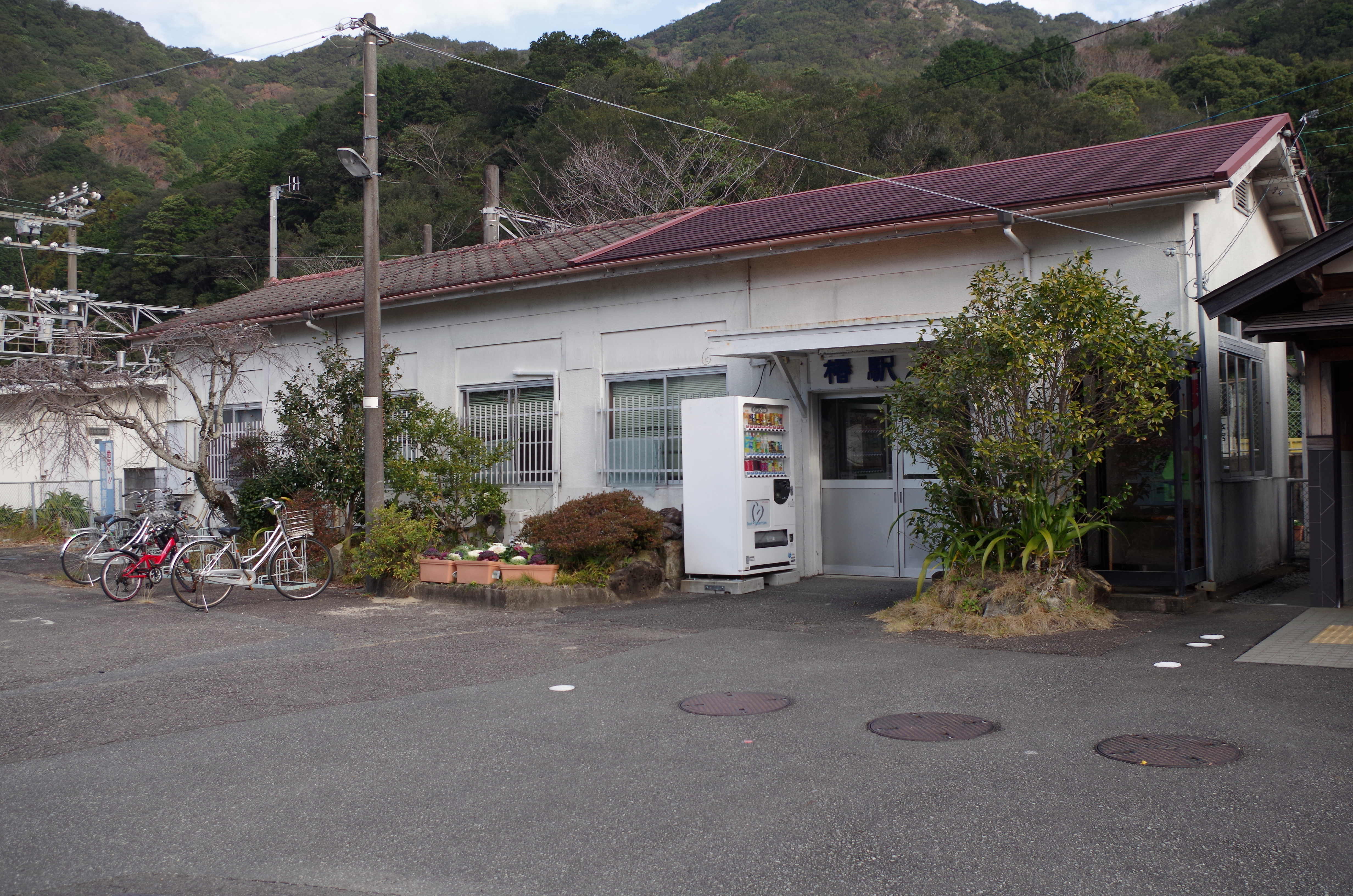 駅舎